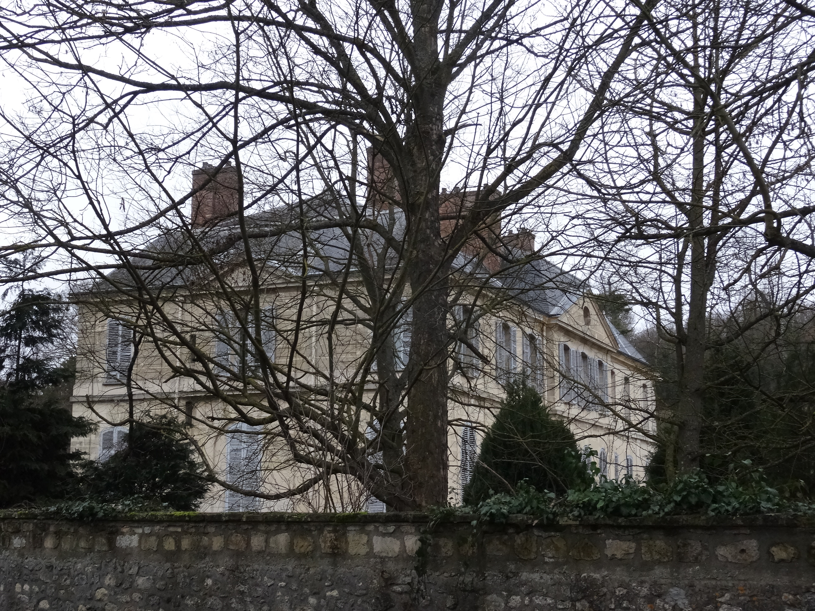 Château de Grand'Maison à Villepreux. (Yvelines, région Île-de-France).